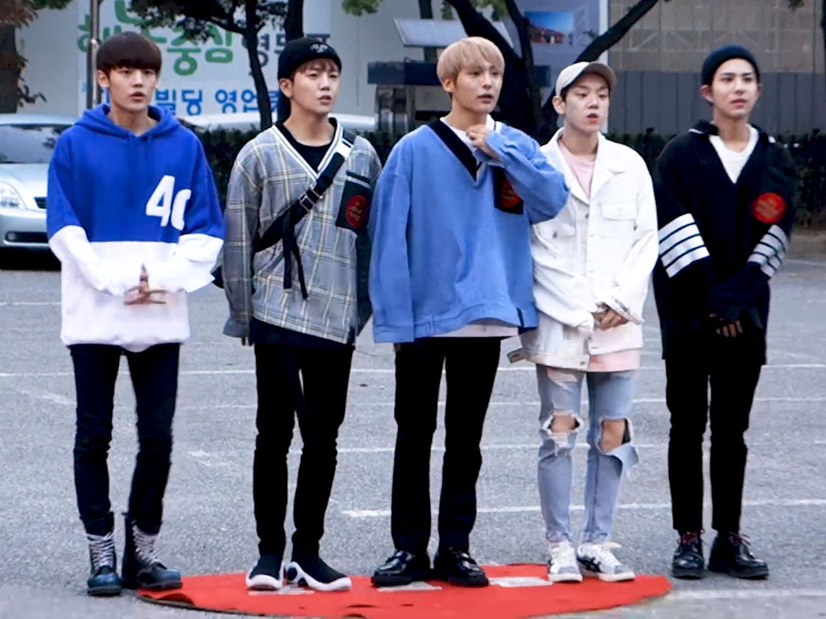 171027 KBS 뮤직뱅크 출근길